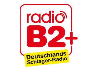 Logo von radioB2 + Deutschlands Schlager-Radio